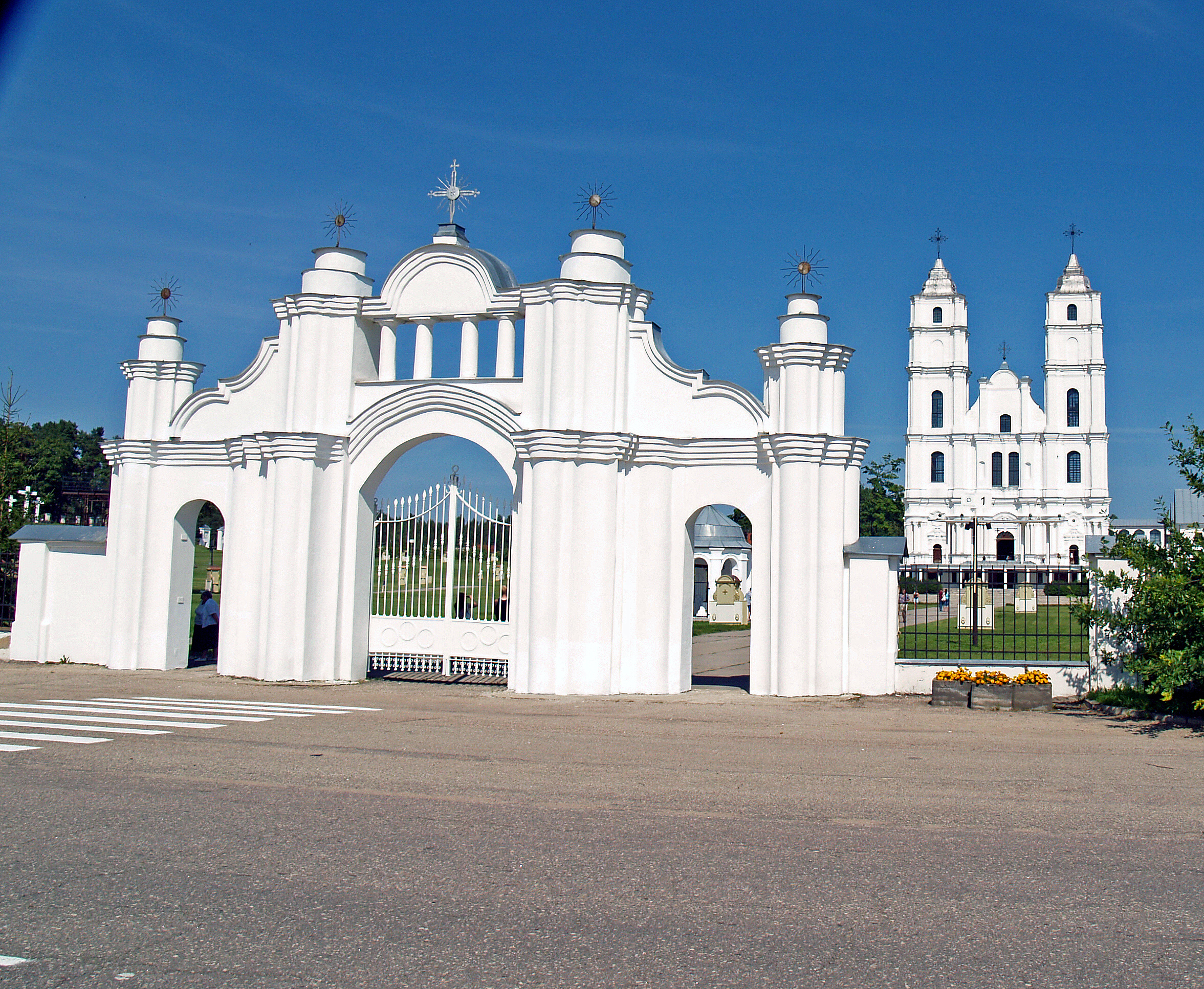 Aglonas katoļu bazilika (Aglona Catholic Basilica)